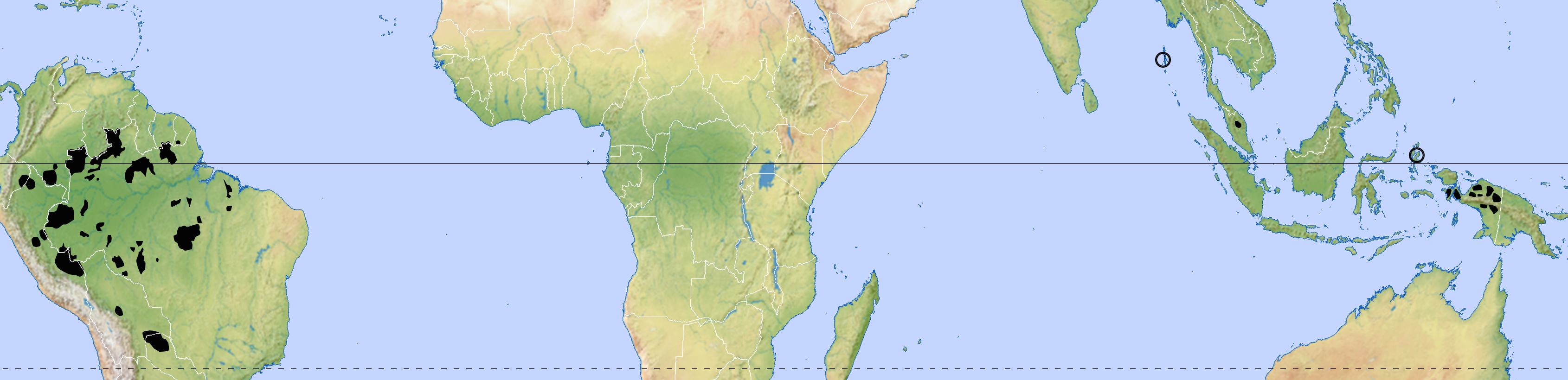 1 Kartographie Eckert VI-Projektion (nahezu flächentreu, realistische Größenverhältnisse, relativ wenig verzerrt), erstellt mit (Lizenz CC-BY) modifiziertes Satellitenbild: Reliefkarten von "Natural Earth" und Satellitenbilder aus dem "Blue Marble"-Projekt der NASA (beides public domain) Datengrundlagen: Survival International: Where are they? Native Planet: Temiar Bob Holmes: How many uncontacted tribes are left in the world? Daily News in: vom 22. August 2013.